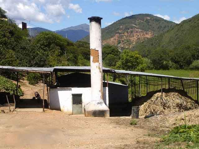 Foto tomada en la poblacion de La Playa-La Platera, Carche, edo. Trujillo, Venezuela.